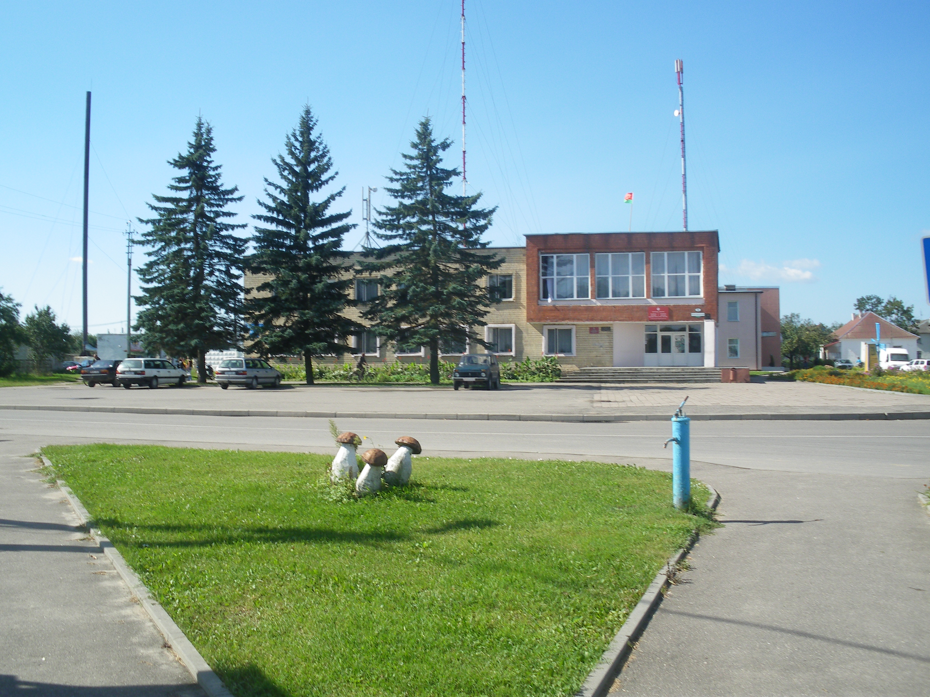 Centrum miasta Raduń